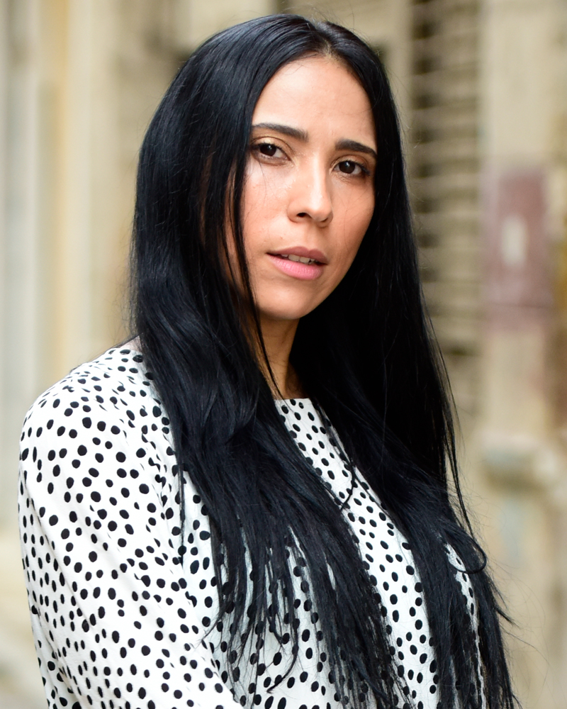 Yuliet Cruz en 2020